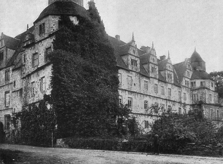 Originalbeschreibung „Schloß Varenholz“. – Varenholz, Kalletal, Nordrhein-Westfalen, Deutschland.